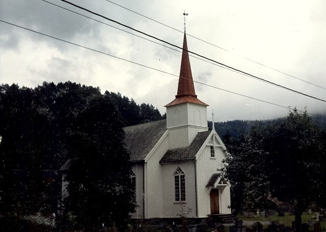 Austefjord kirke